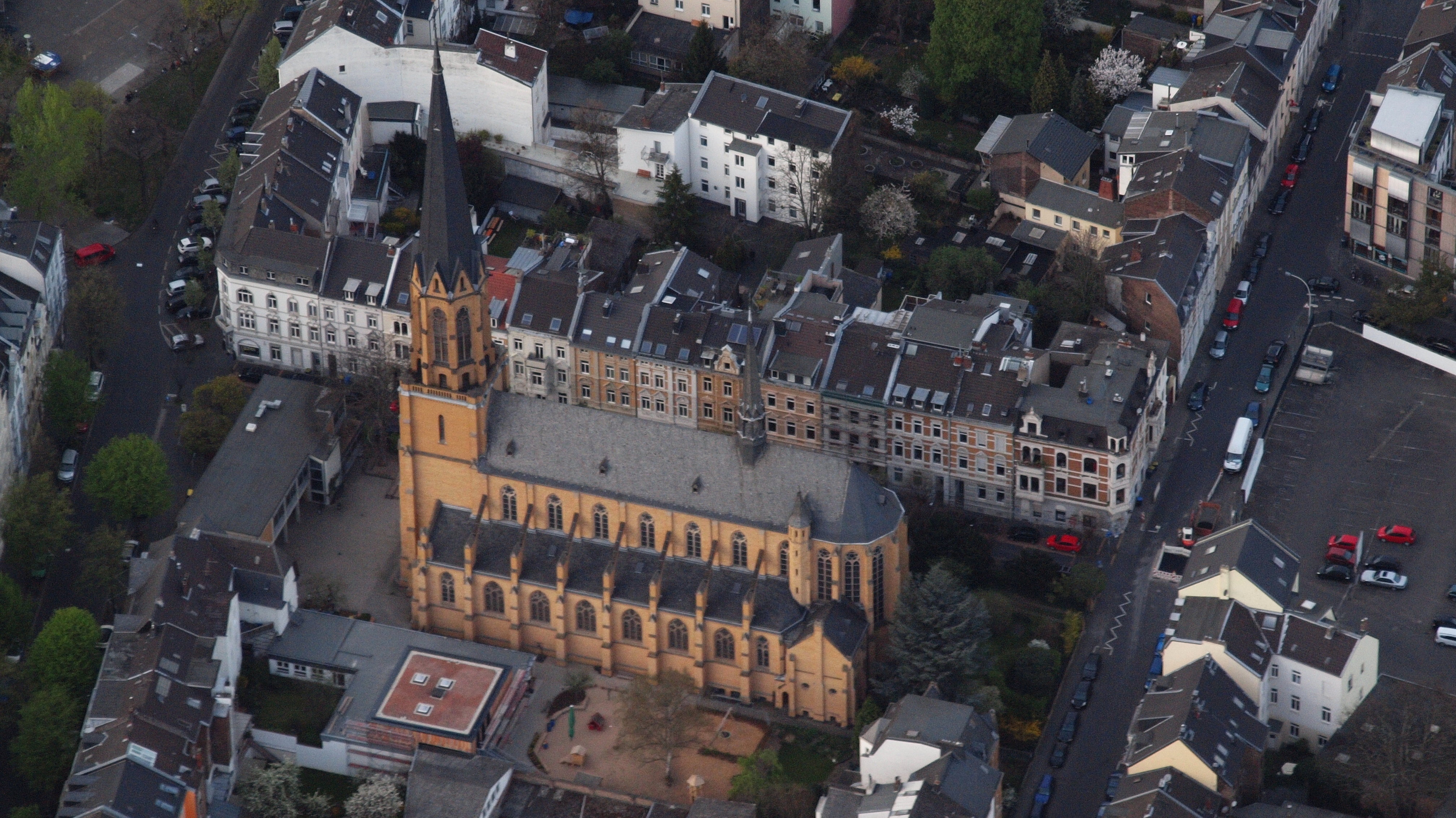 St. Marien-Kirche, Oppenhoffstraße, Bonn-Nordstadt: Luftaufnahme; dahinter die Häuserzeile Oppenhoffstraße